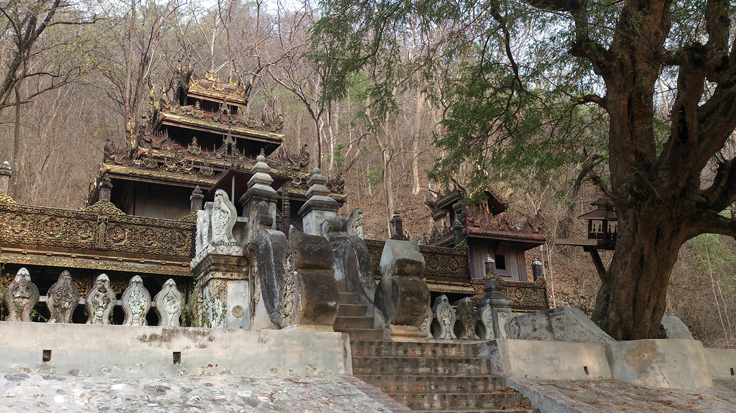 မြန်မာဘာသာ: စစ်ကိုင်း ရုပ်စုံကျောင်း